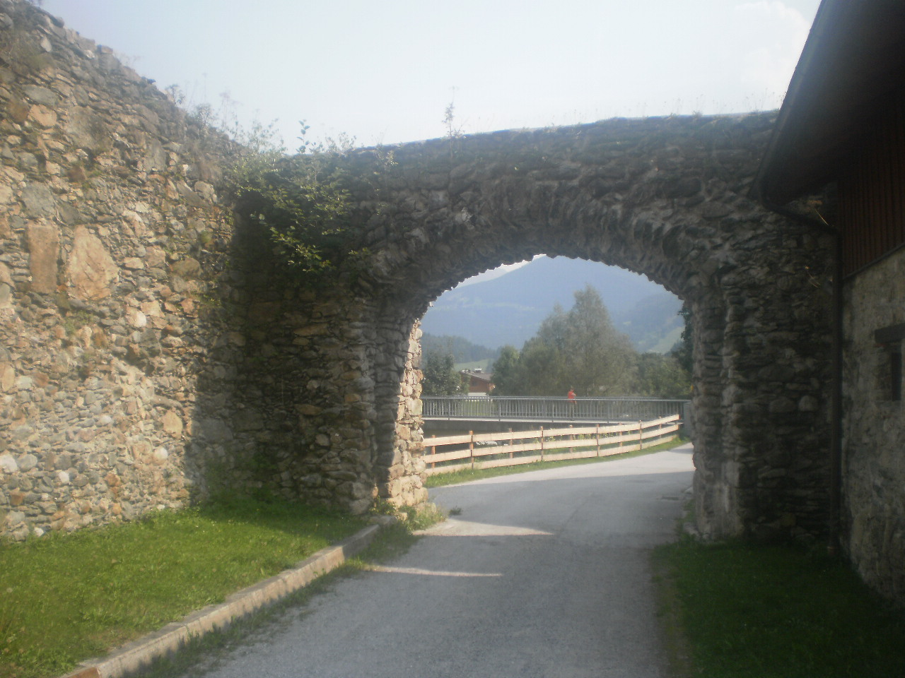 Festungsanlage, Pass Mandling. Tordurchbruch aus dem Jahr 1941. Der Torbogen steht auf GstNr. 807/3, die Mauer links zum Mandlingbach steht auf GstNr. 6/2 und beides unter Denkmalschutz.